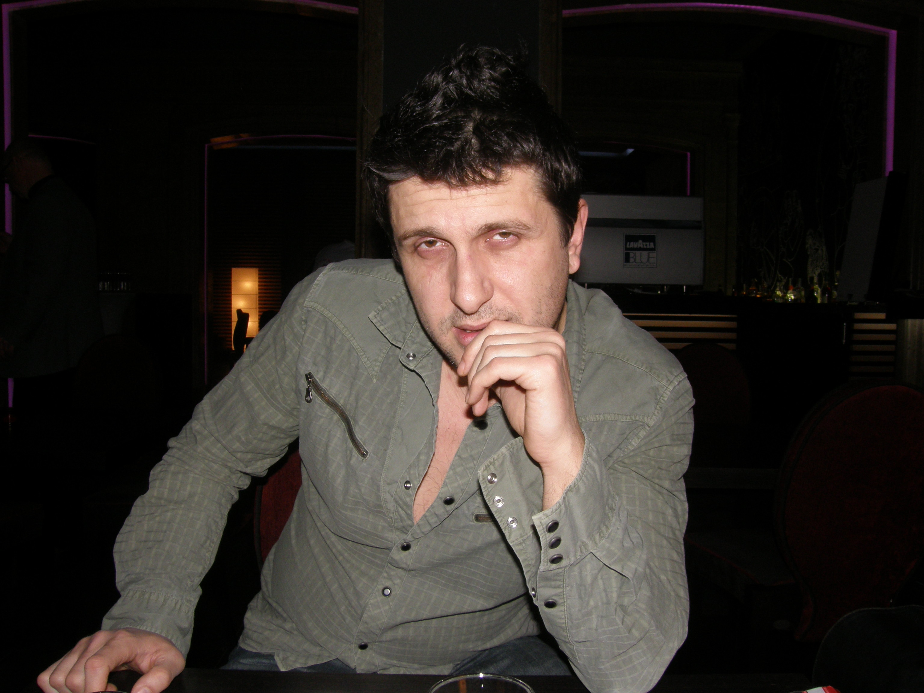 Асен Блатечки - актьор